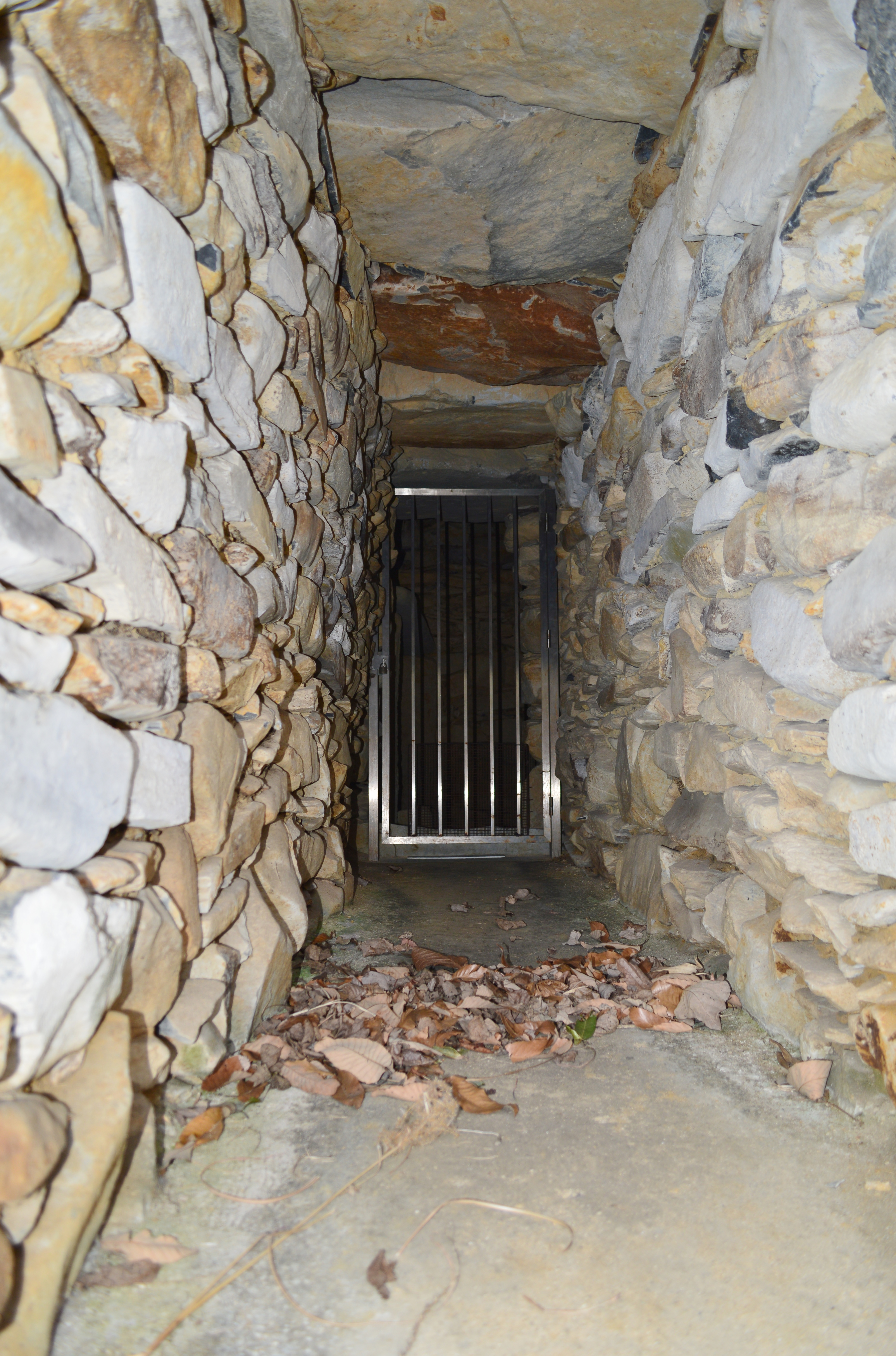 王墓山古墳 (善通寺市) 石室羨道